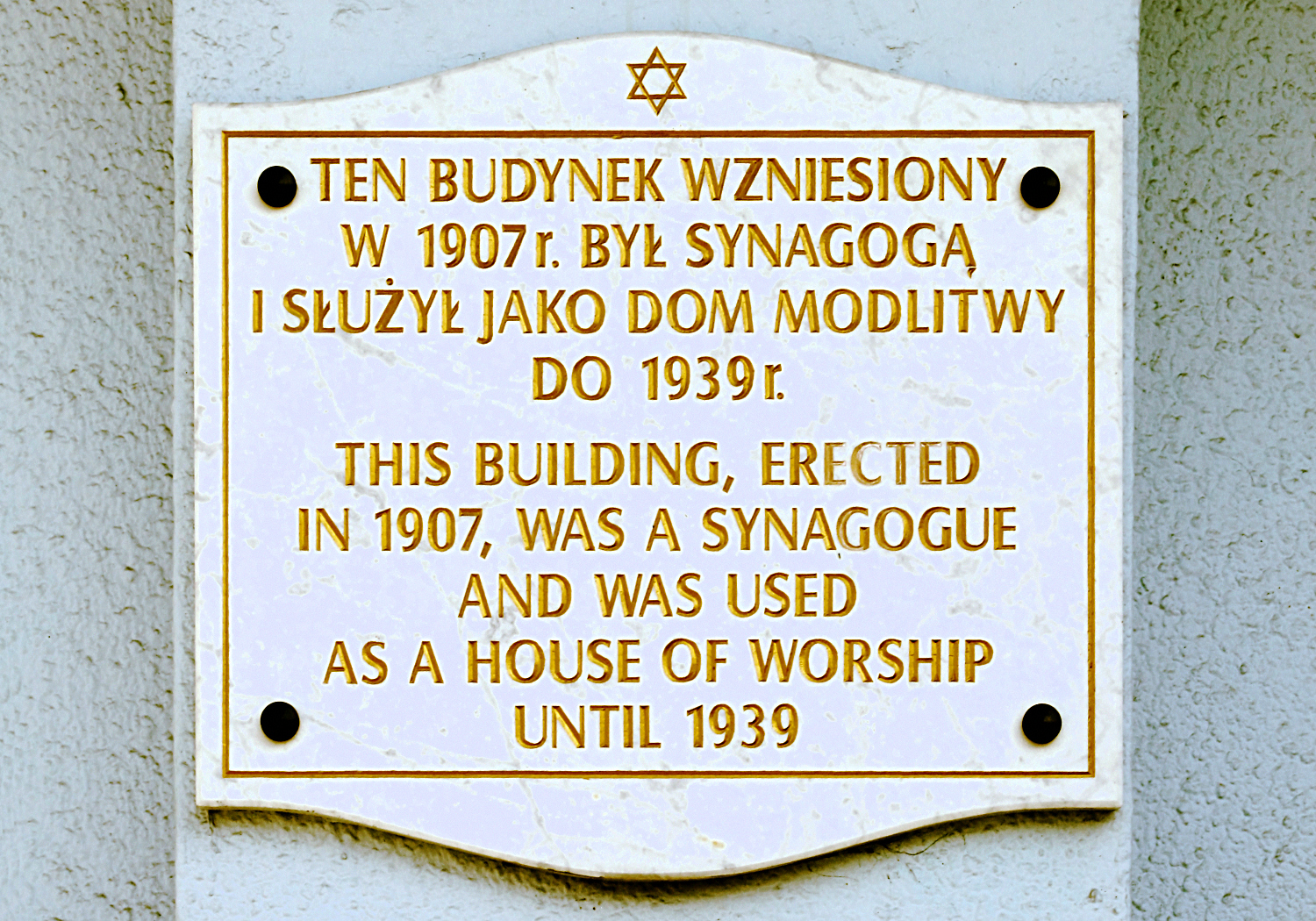 Poznań, dawna synagoga (1907); Poznań, former synagogue (1907)